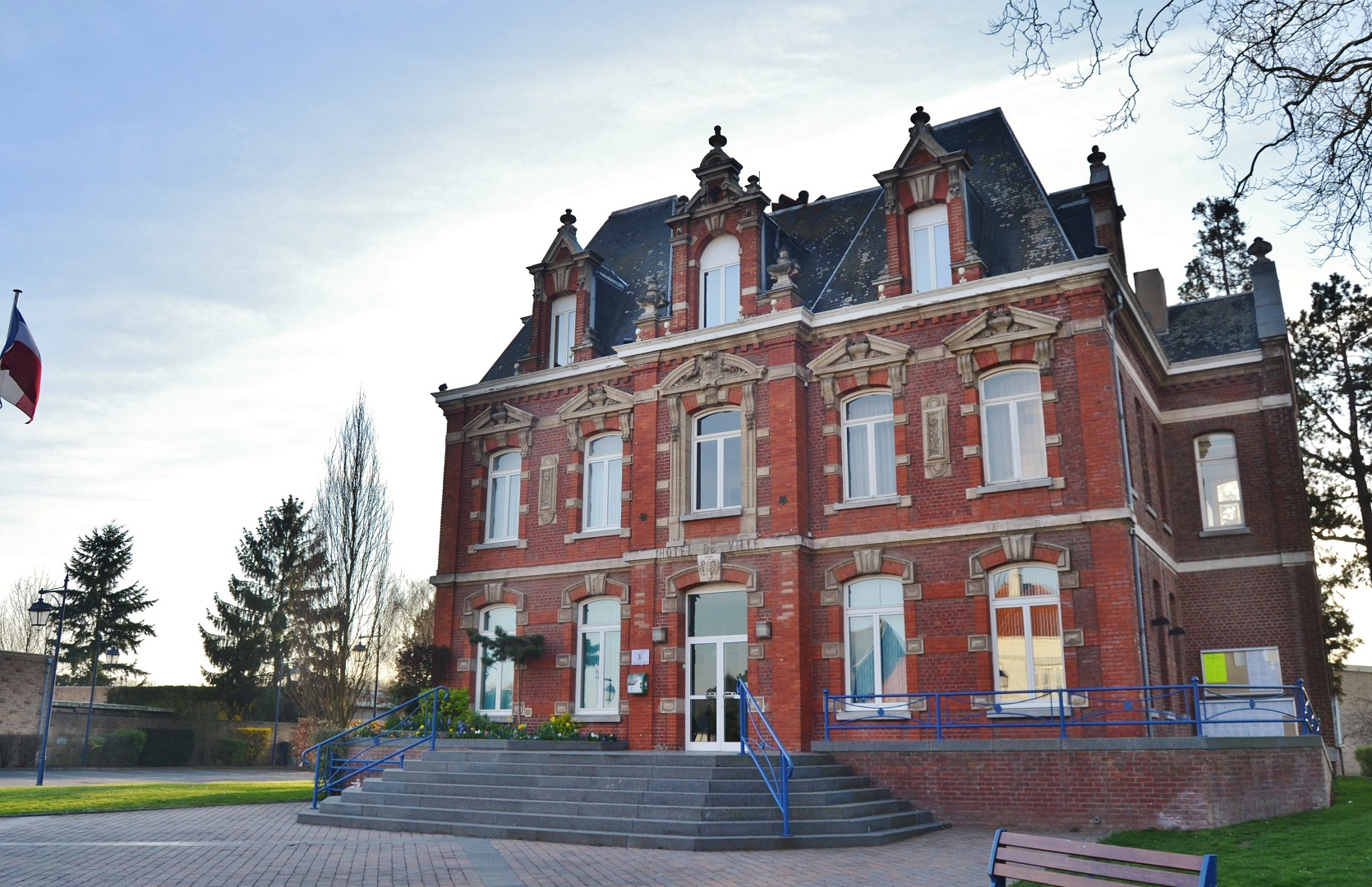 Hotel-de-Ville